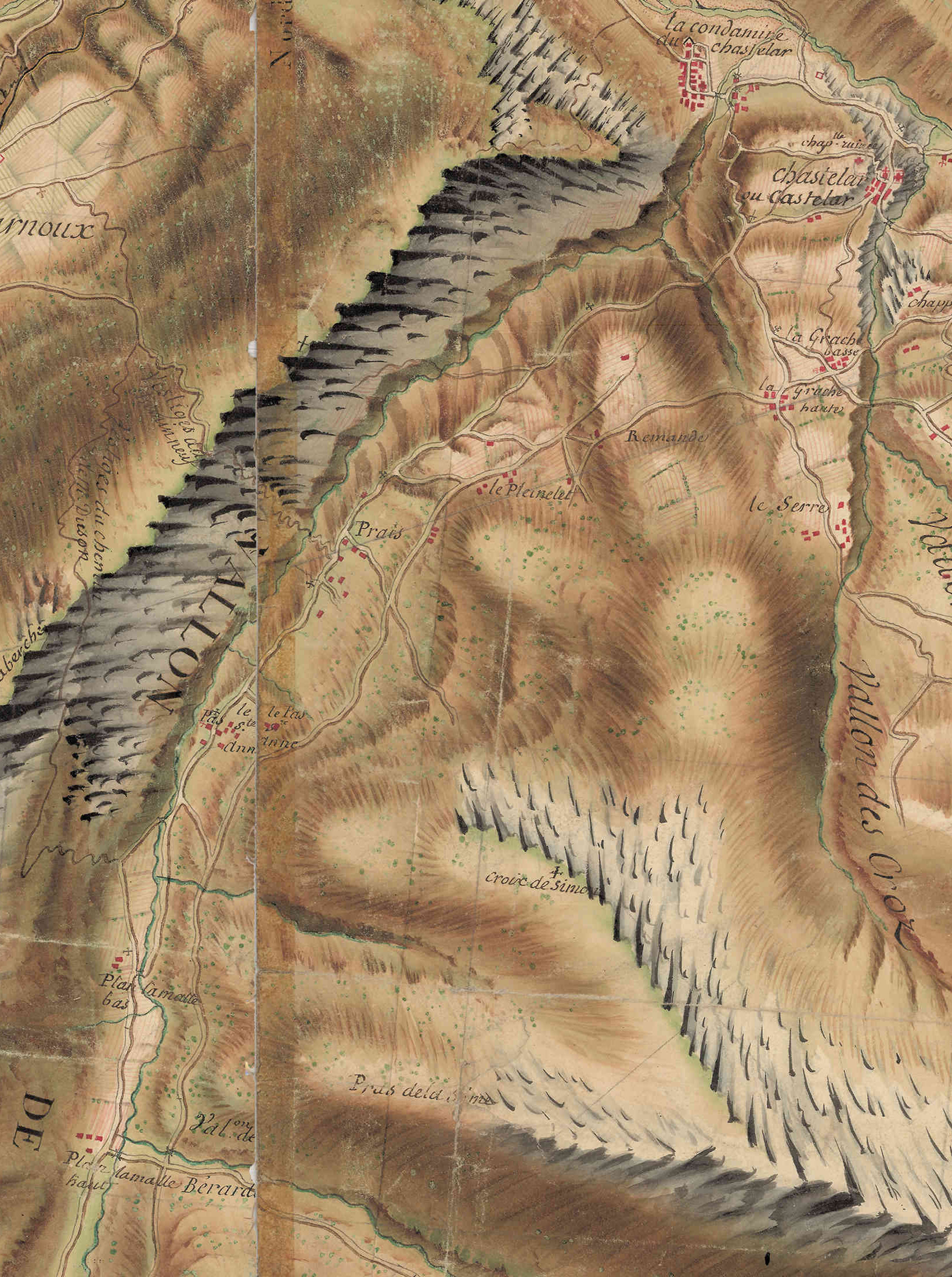 carte de Bourcet numérisé Paris, Nicolas-Alexandre et Olivier-Joseph, Extrait réduc JPG 30% Antoine-H